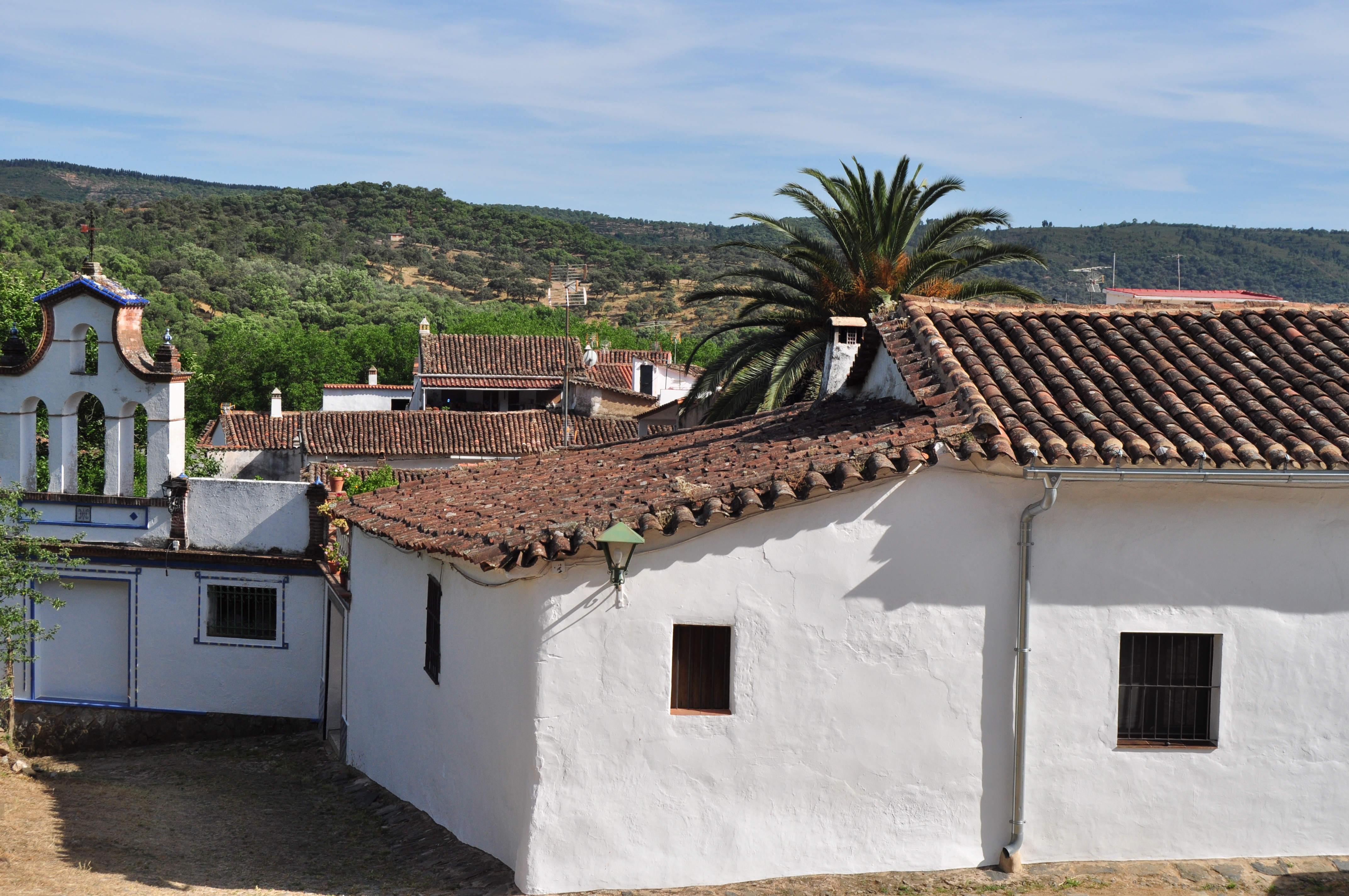 Linares de la Sierra - 001